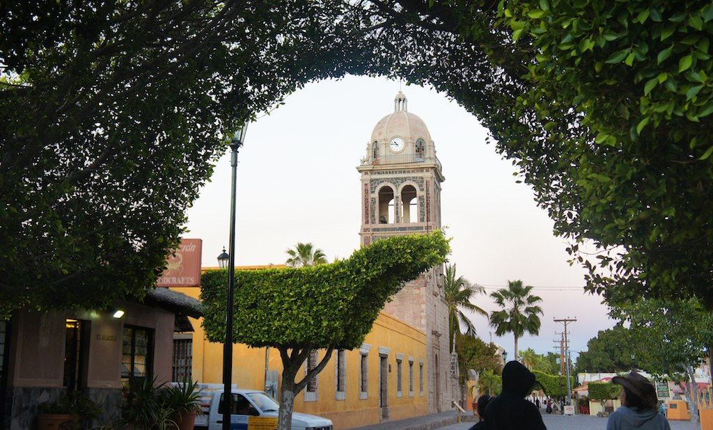 Baja California Sur.